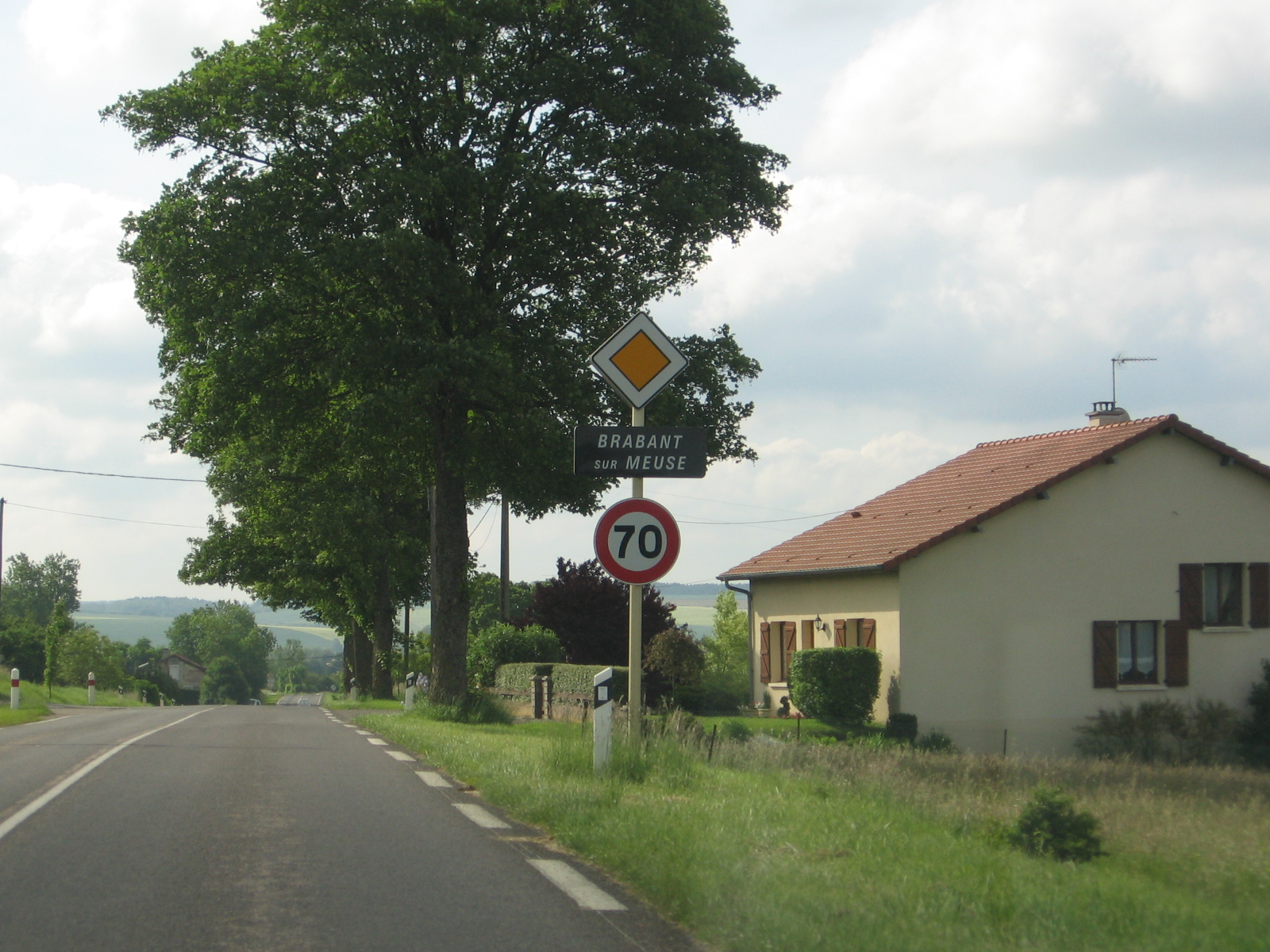 Brabant_sur_Meuse